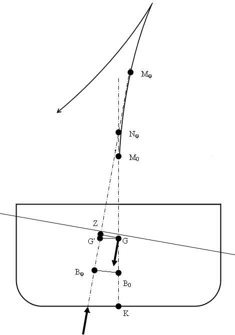 Eigen ontwerp.